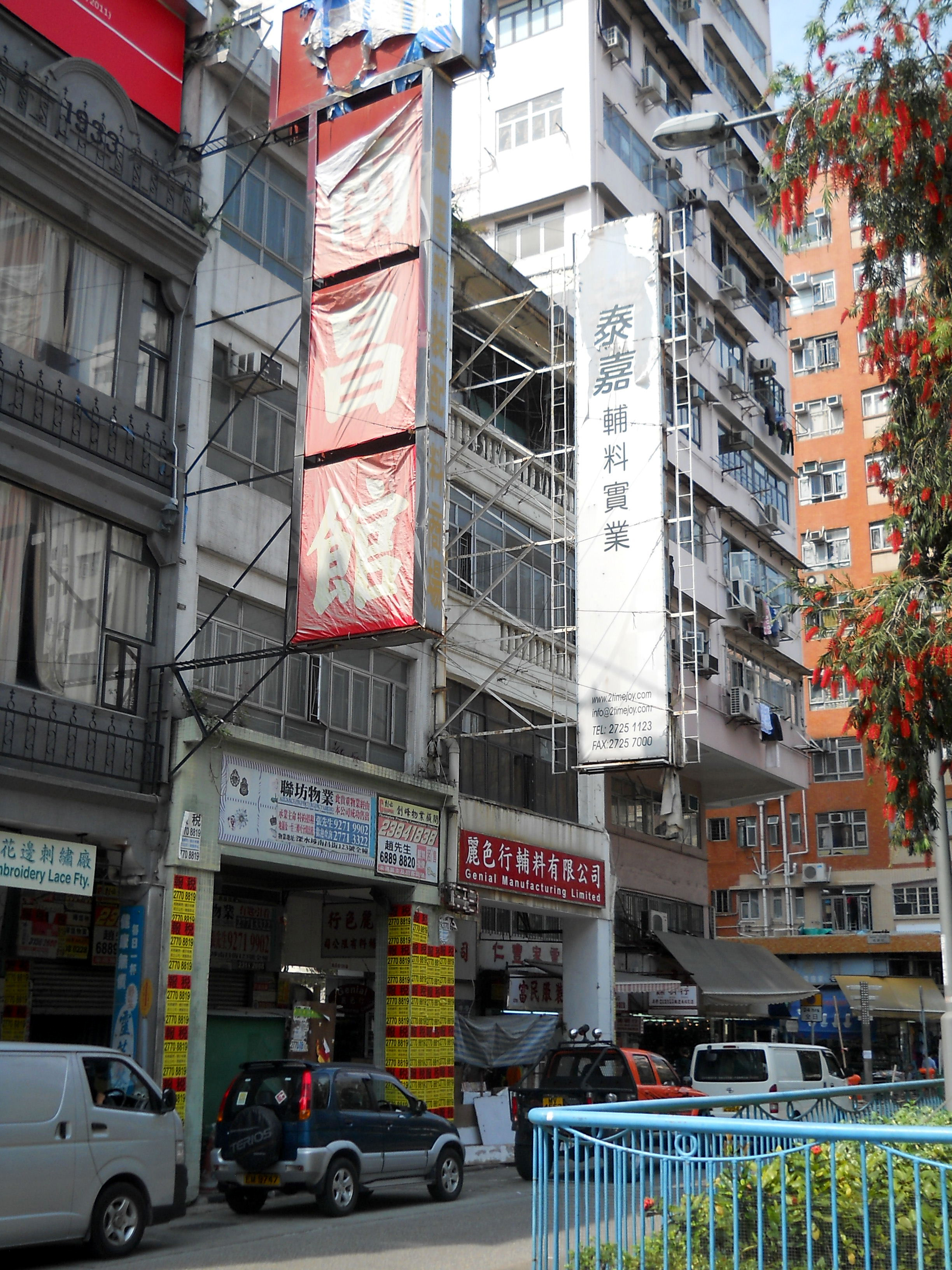 中文（香港）: 南昌街123、125號